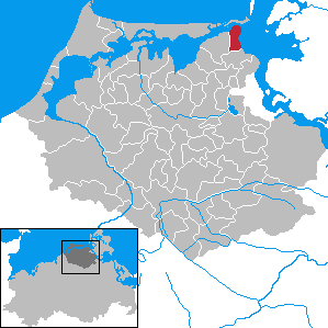 Klausdorf in Mecklenburg-Vorpommern - District Nordvorpommern